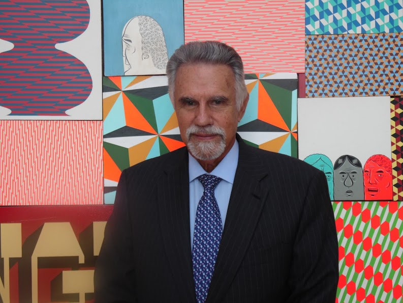 Juan David Morgan frente a una de las pinturas exhibidas en el edificio MMG Tower, año 2016.